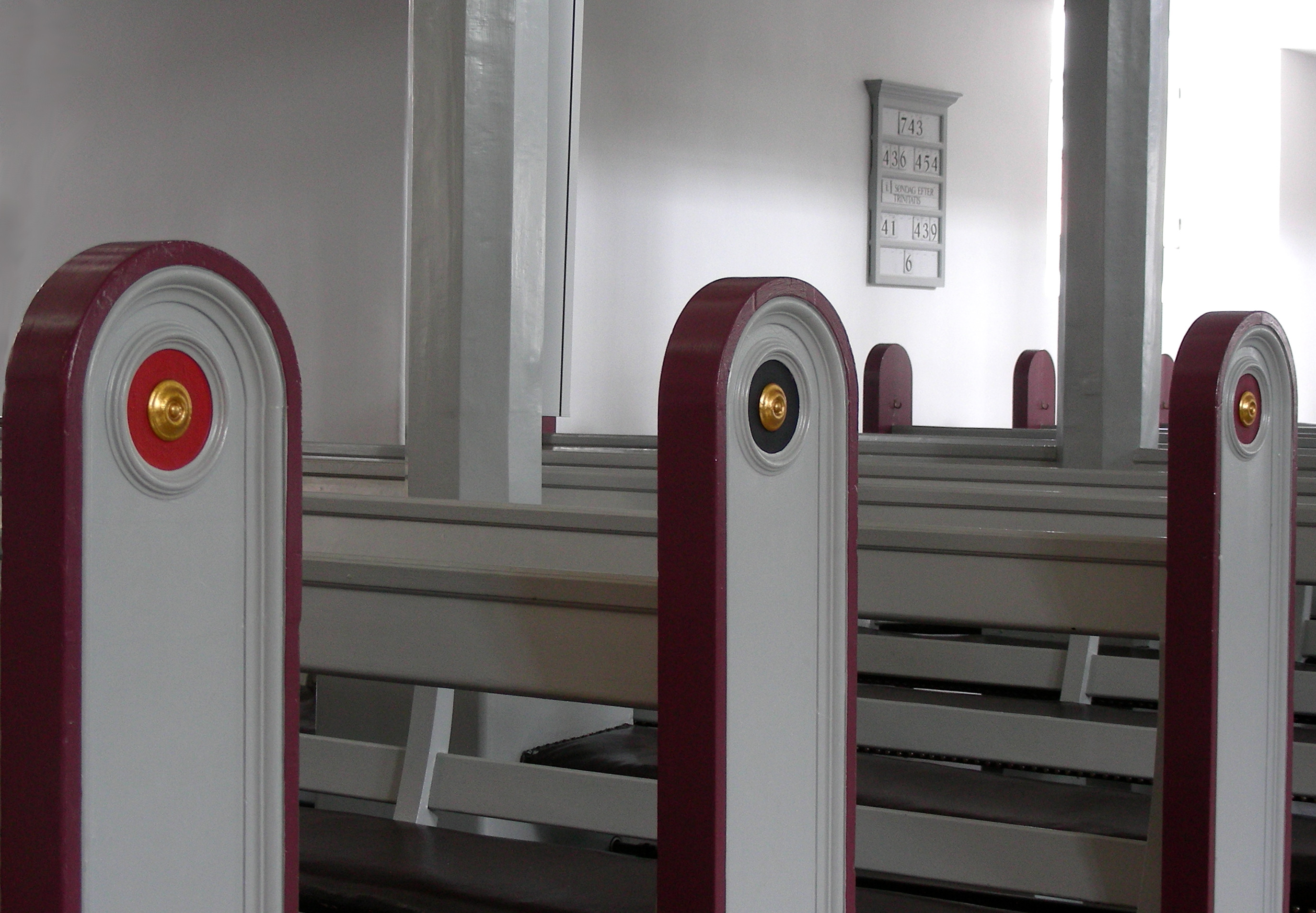 Garnisons Kirke (Garrison Church), Copenhagen, Denmark. Pews.